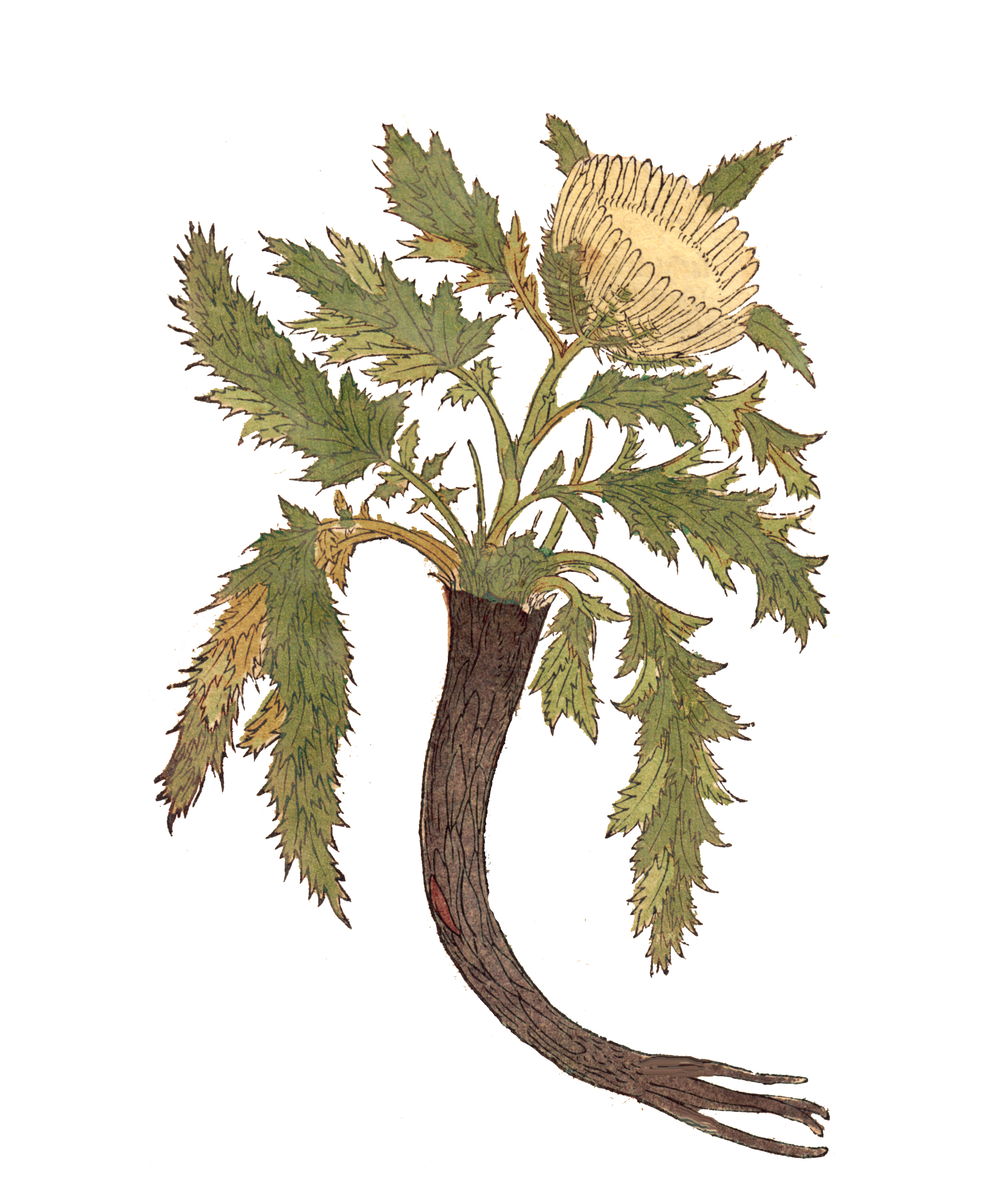 Eberwurz (Carlina acaulis)